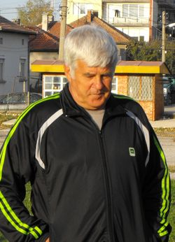 Младен Василев - футболист, треньор, български национал en: Mladen Vasilev - former football player, coach, Bulgarian national